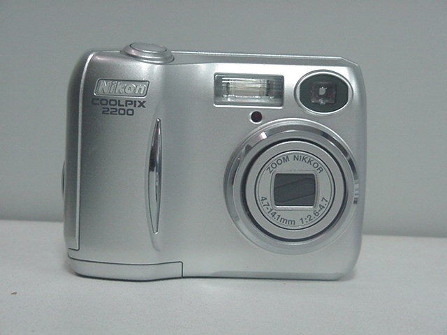 Appareil photographique numérique Nikon Coolpix 2200